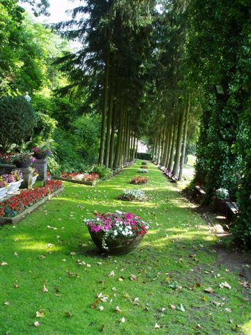 lengelsheim